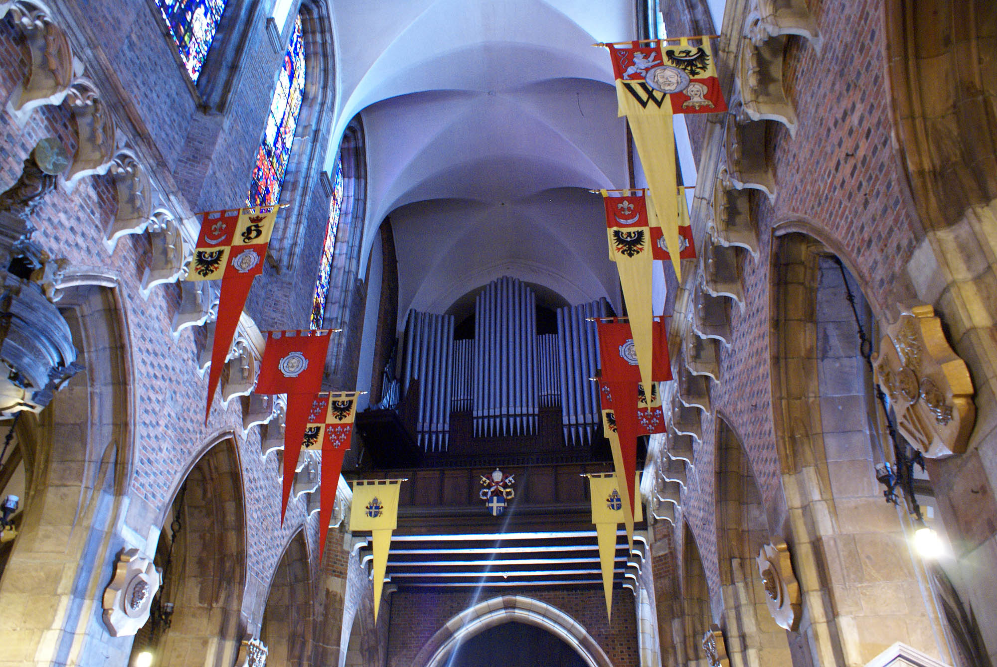 Wrocław, katedra p.w. św. Jana Chrzciciela, 1244-1272, XIV/XV, XIX, po 1945